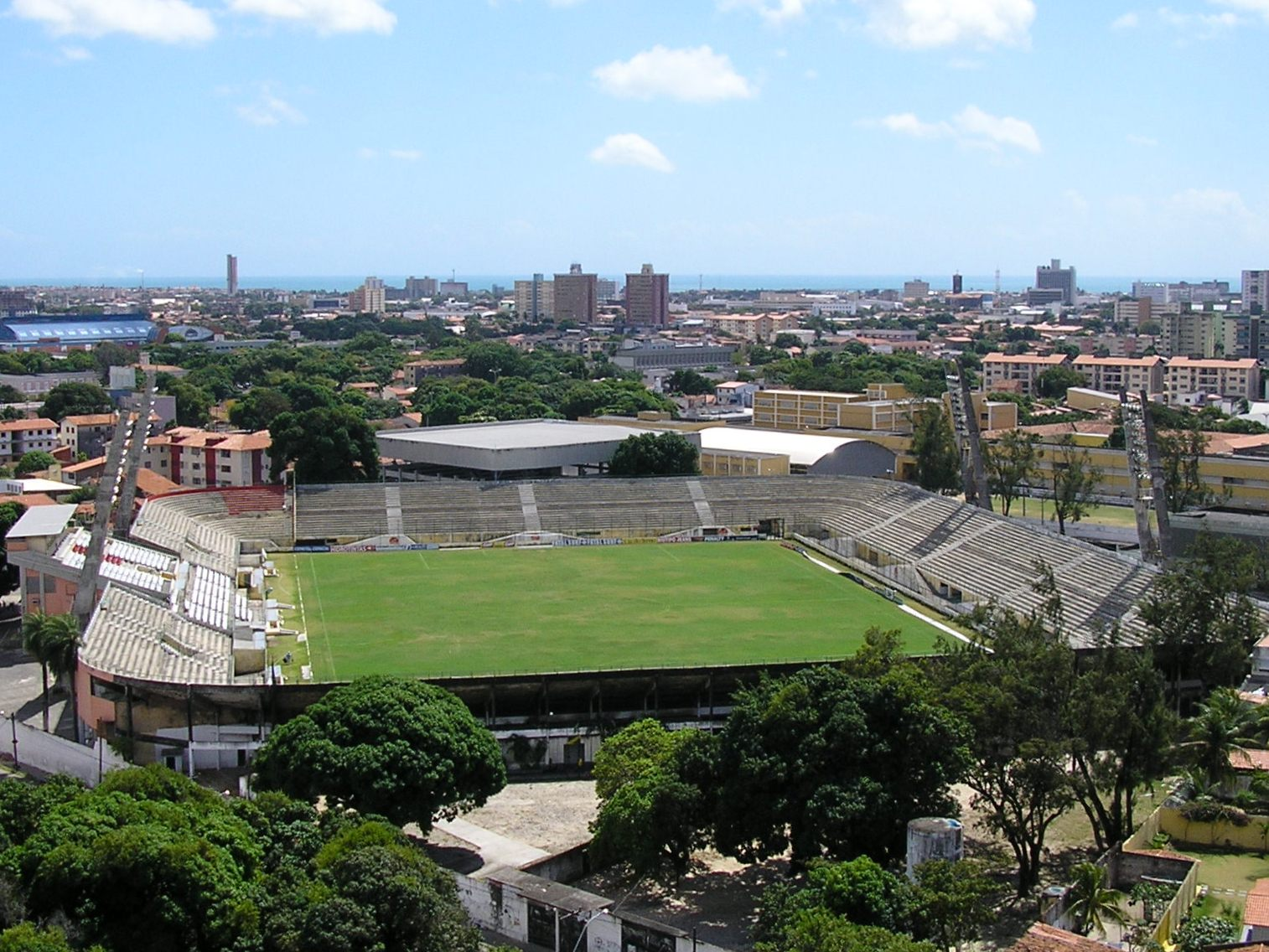 Estádio Presidente Vargas. Fortaleza, Ceará, Brasil.